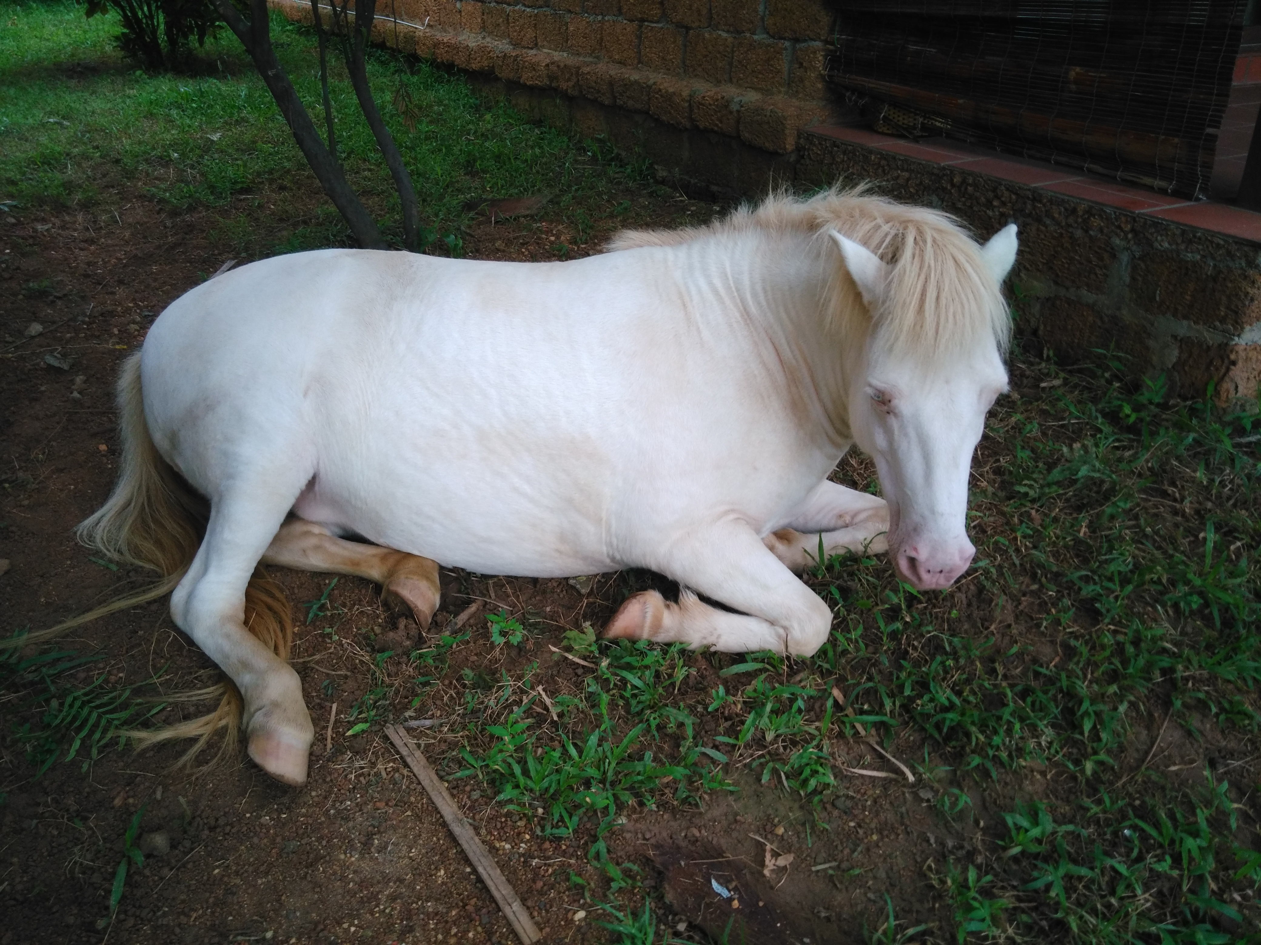 Hình tự chụp bằng máy điện thoại cá nhân về một con ngựa bạch Việt Nam tại Trung Sơn Trầm, Sơn Tây